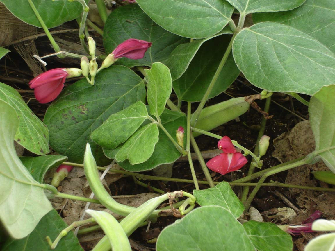 Canavalia sericea (lautolu veveli) on Tongatapu